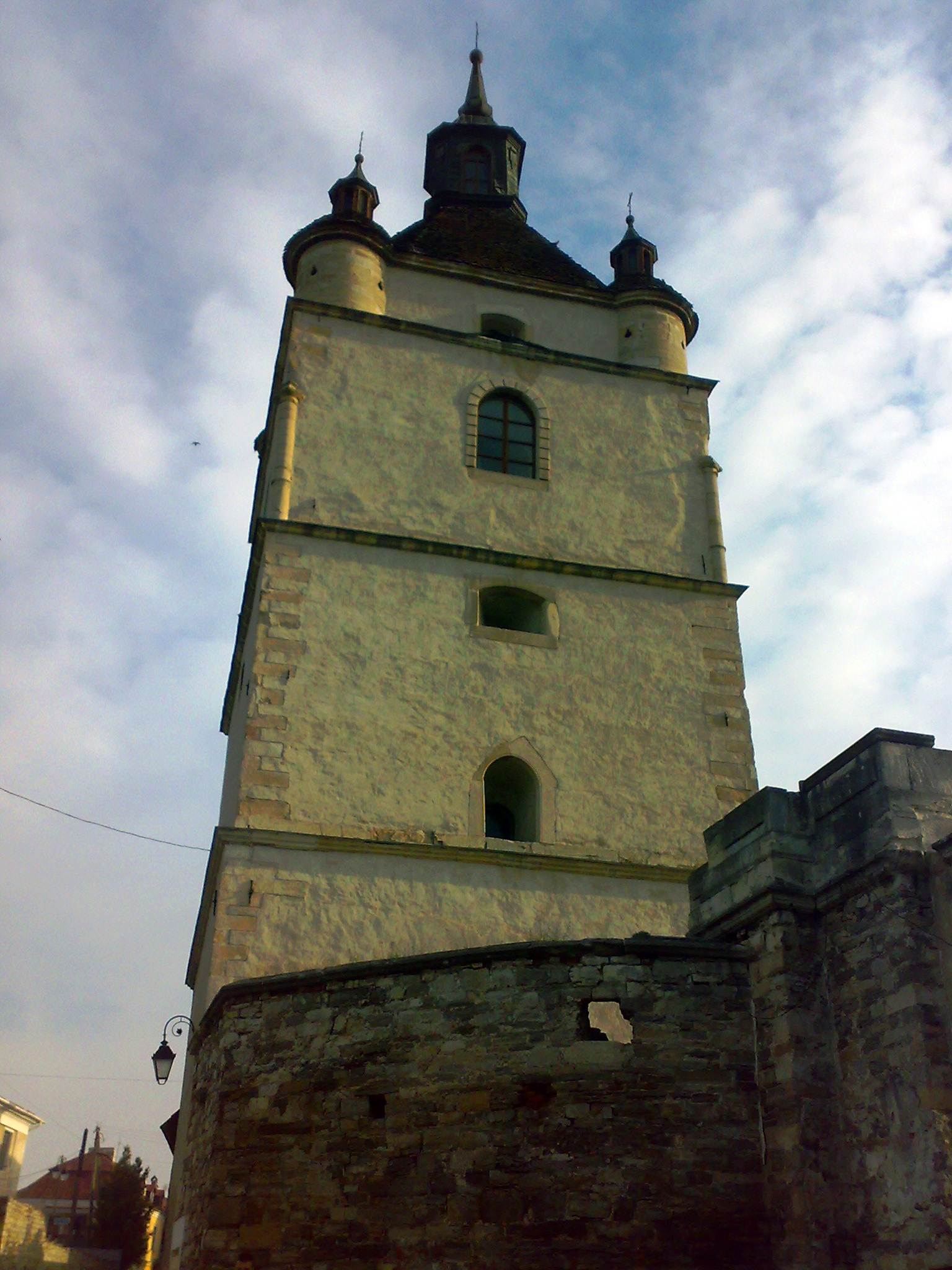 Дзвіниця вірменського костелу (Кам'янець-Подільський)